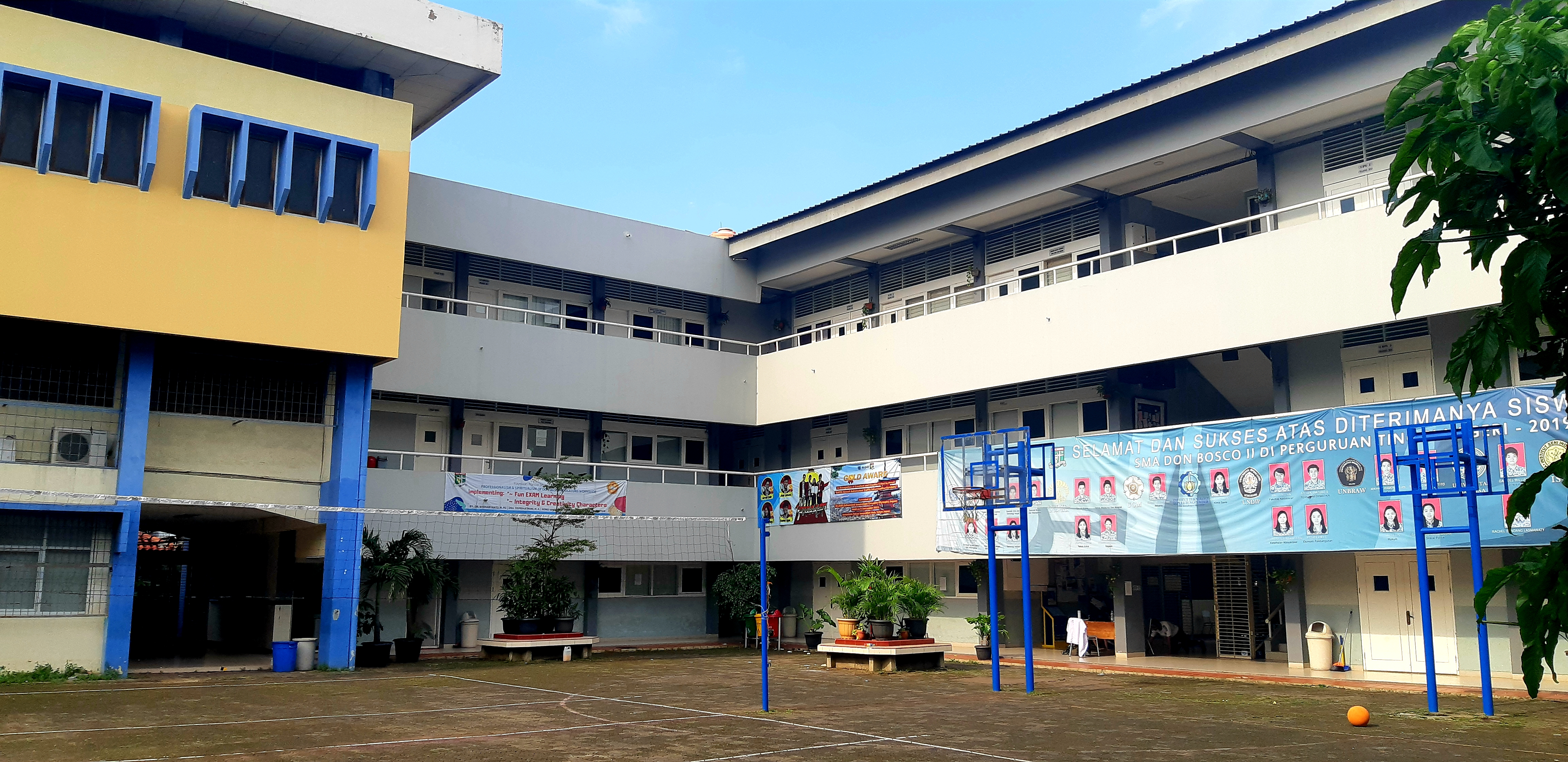 Sekolah Don Bosco II